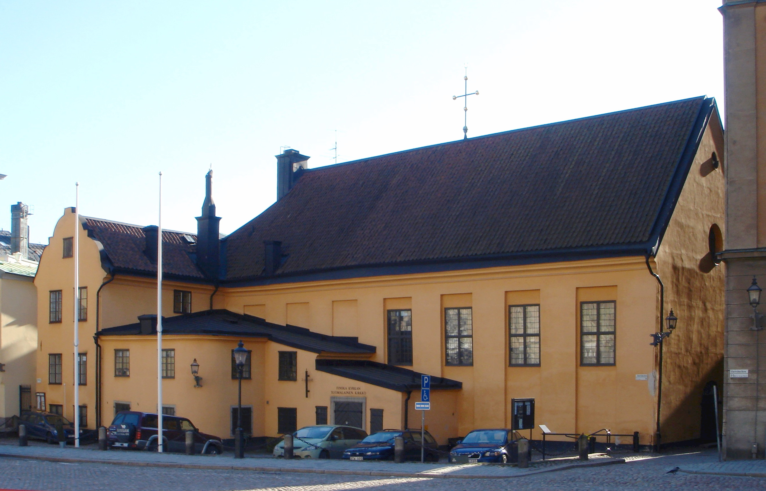 Finska kyrkan